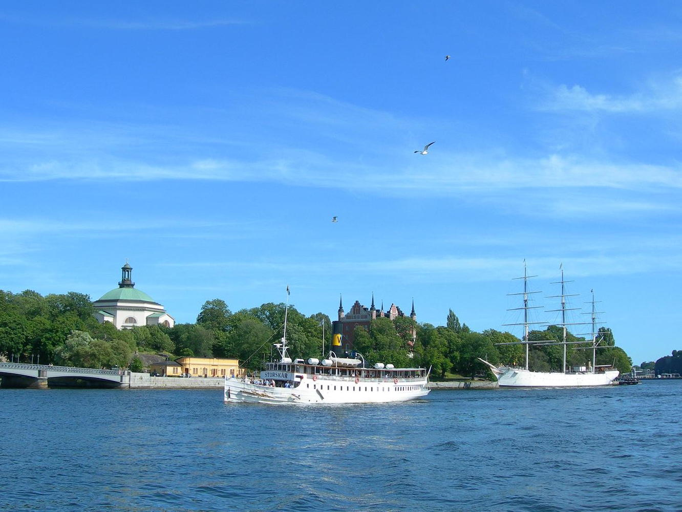 Skeppsholmen, Stockholm, 2006.